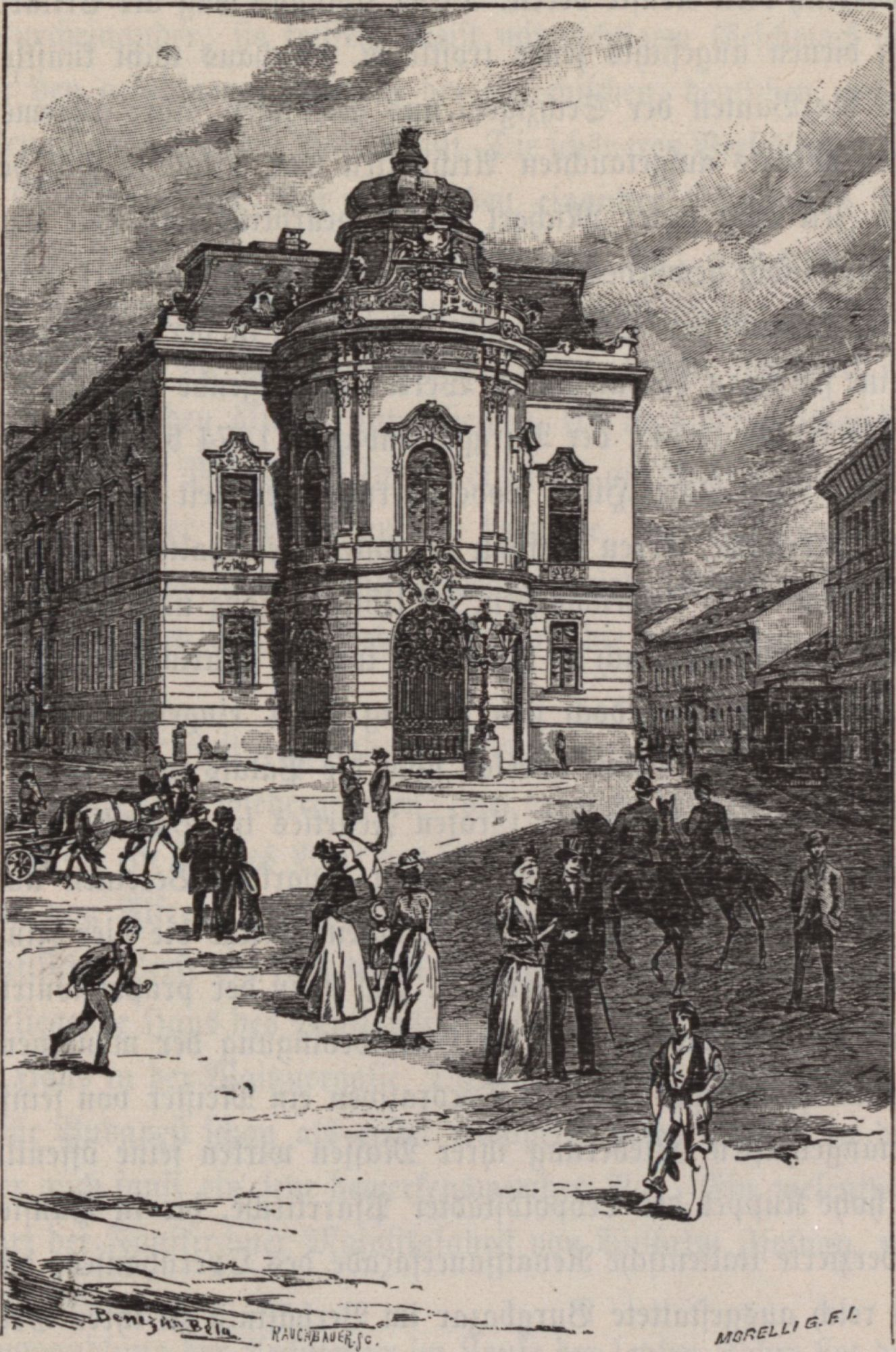 Palais Friedrich Graf Wenckheim in der Stationsgasse